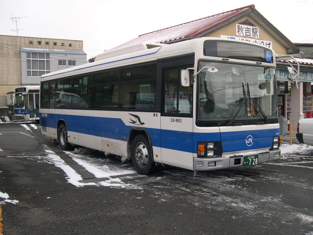 秋吉駅にて撮影